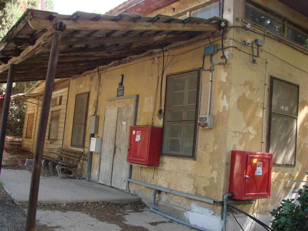 חדר האוכל בגניגר - פינה דרום מערבית